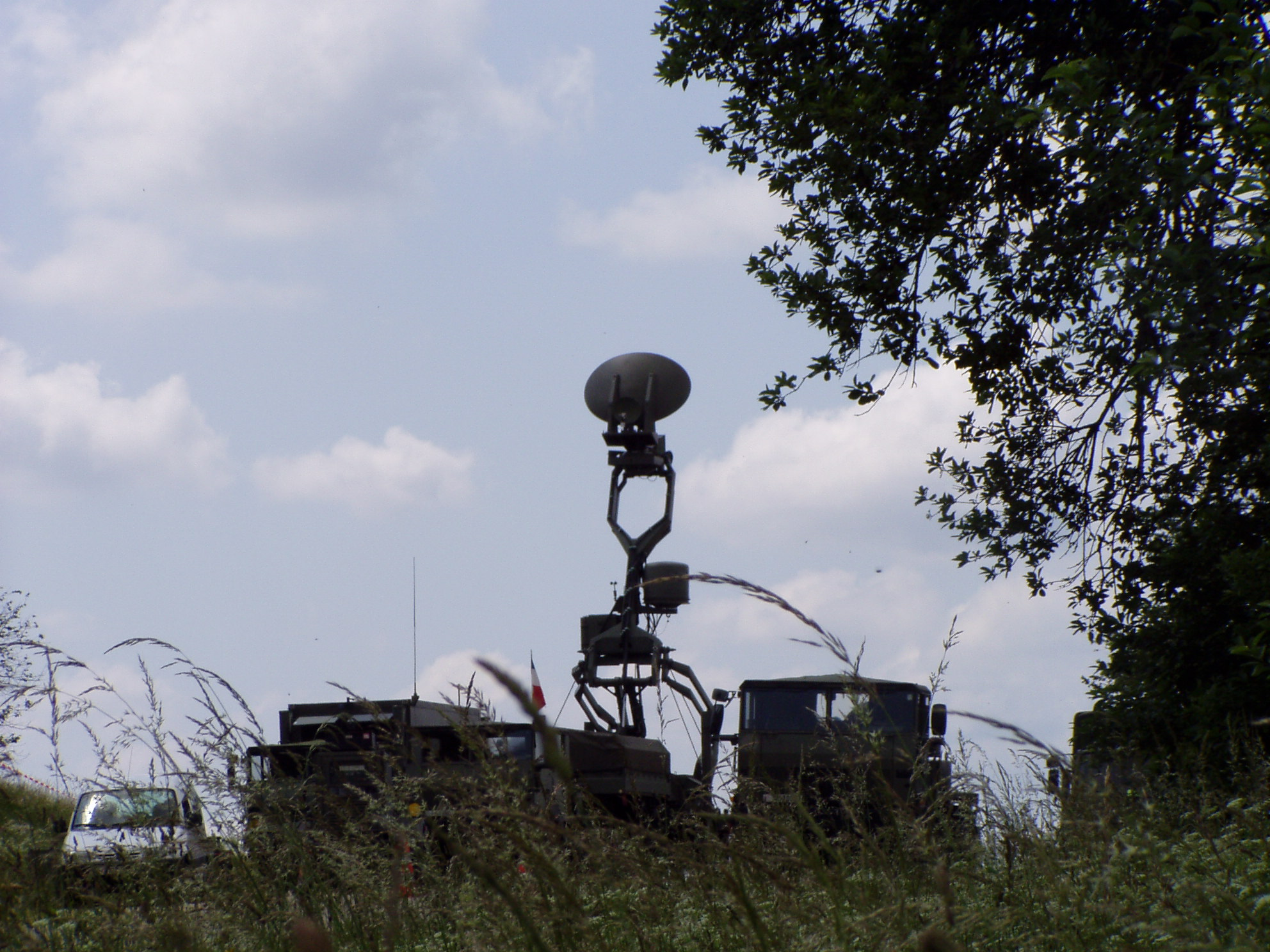 Der Demonstrator FURET der Firma EADS auf der Übung ELITE 2007